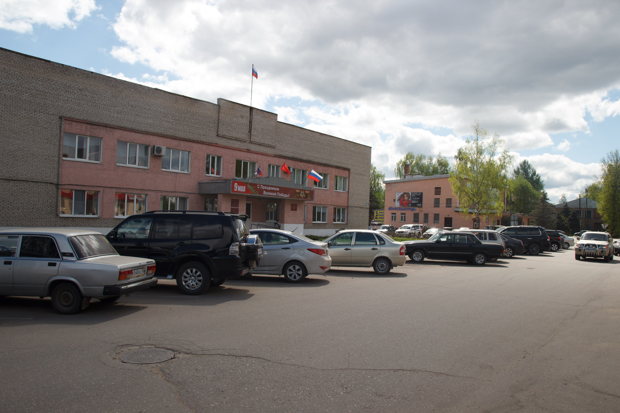 Администрация Пестовского района